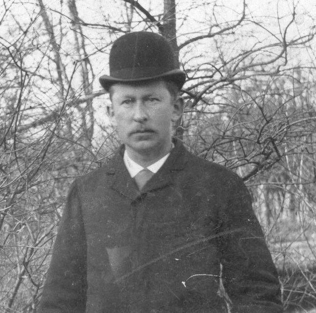 Jan Abraham Rudolph Kymmell (1851-1922)